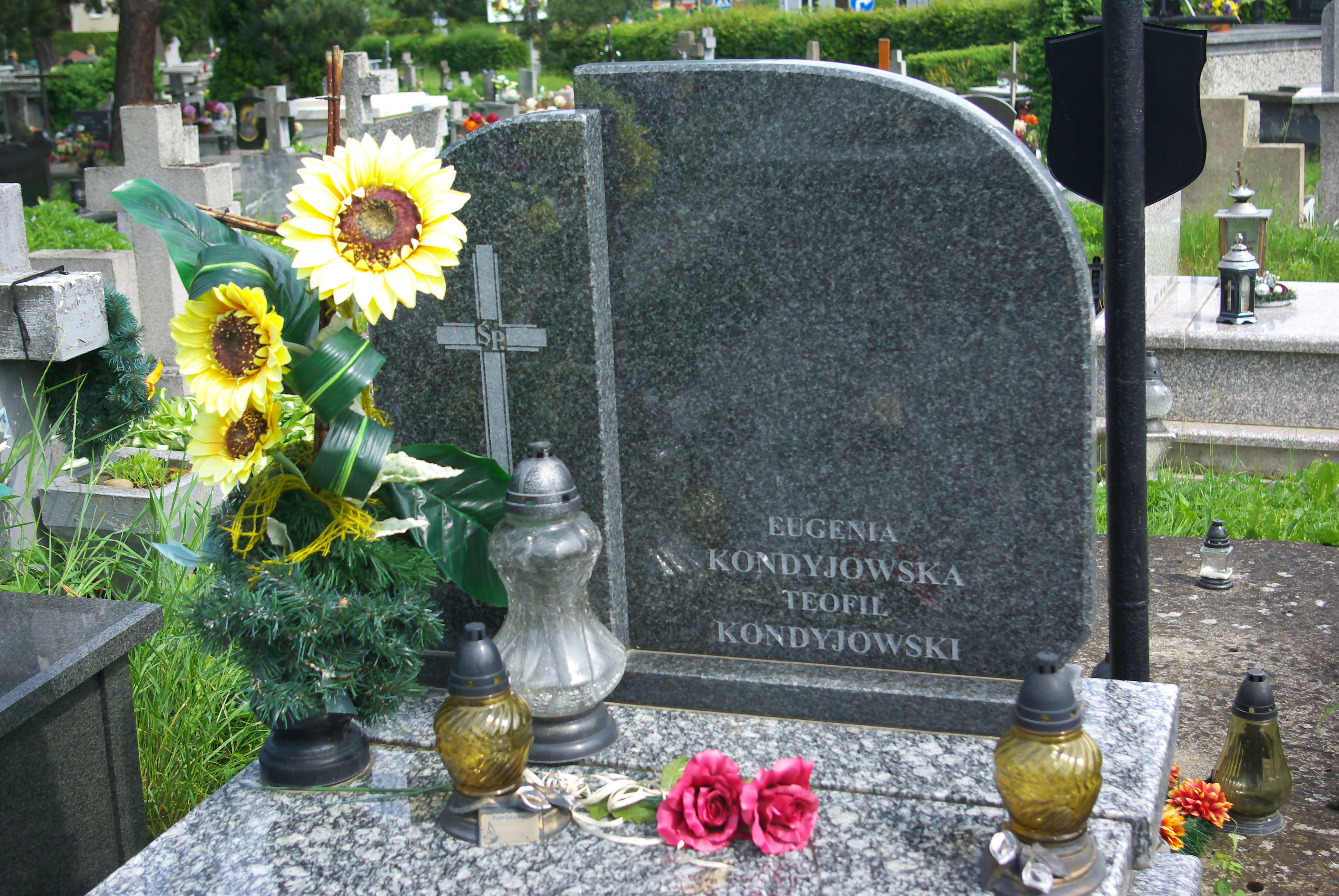 Grobowiec rodziny Kondyjowskich w części "Matejki Stary" Cmentarza Centralnego w Sanoku.